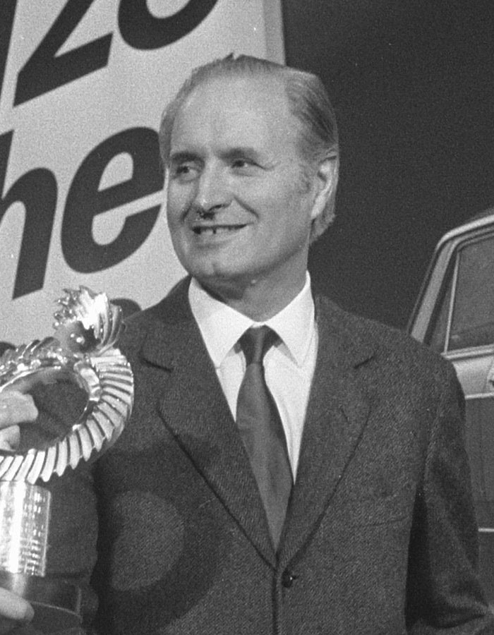 Fiat 128 auto van het jaar. Links dr. Giacosa ontvangen de trophee in Hilton Amsterdam.